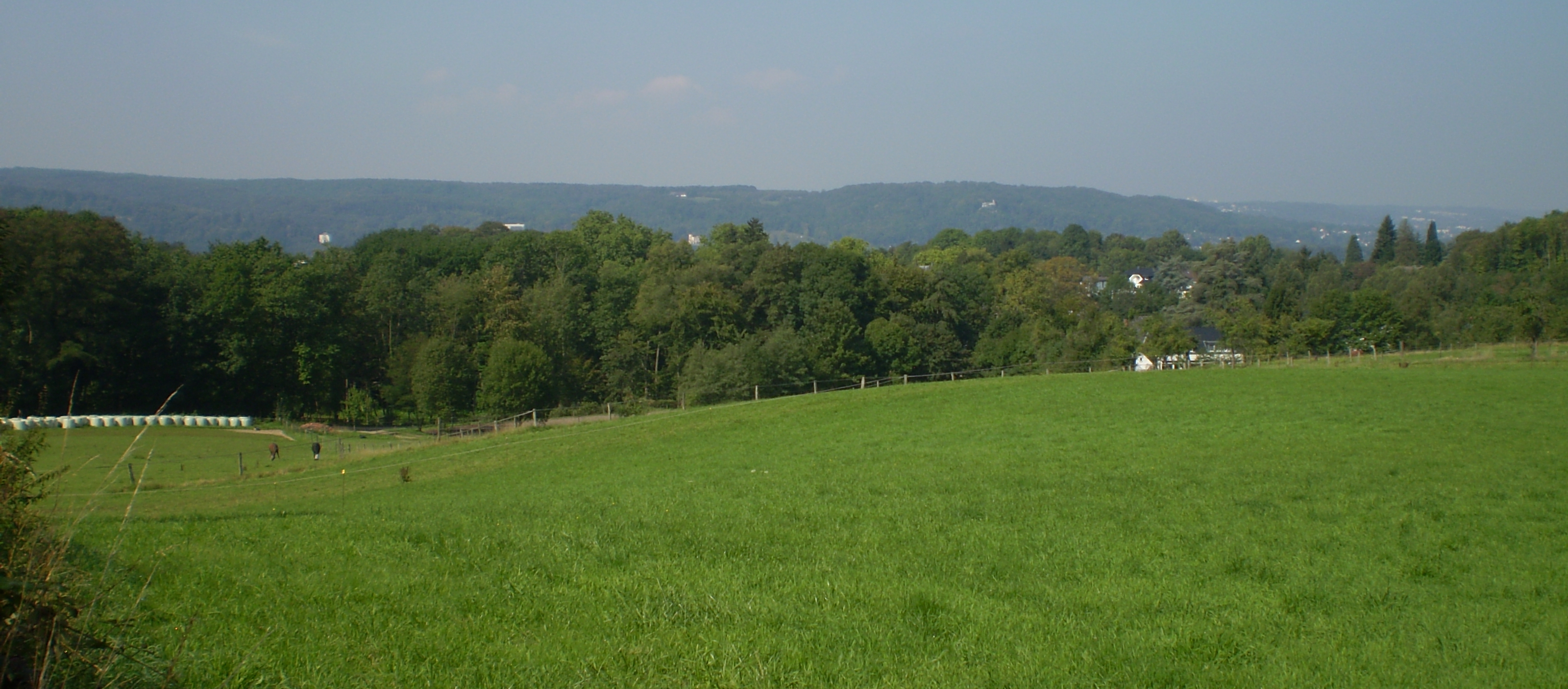 Das Rheintal bei Bad Honnef und Remagen-Nord von einer Wiese oberhalb Menzenbergs aus gesehen